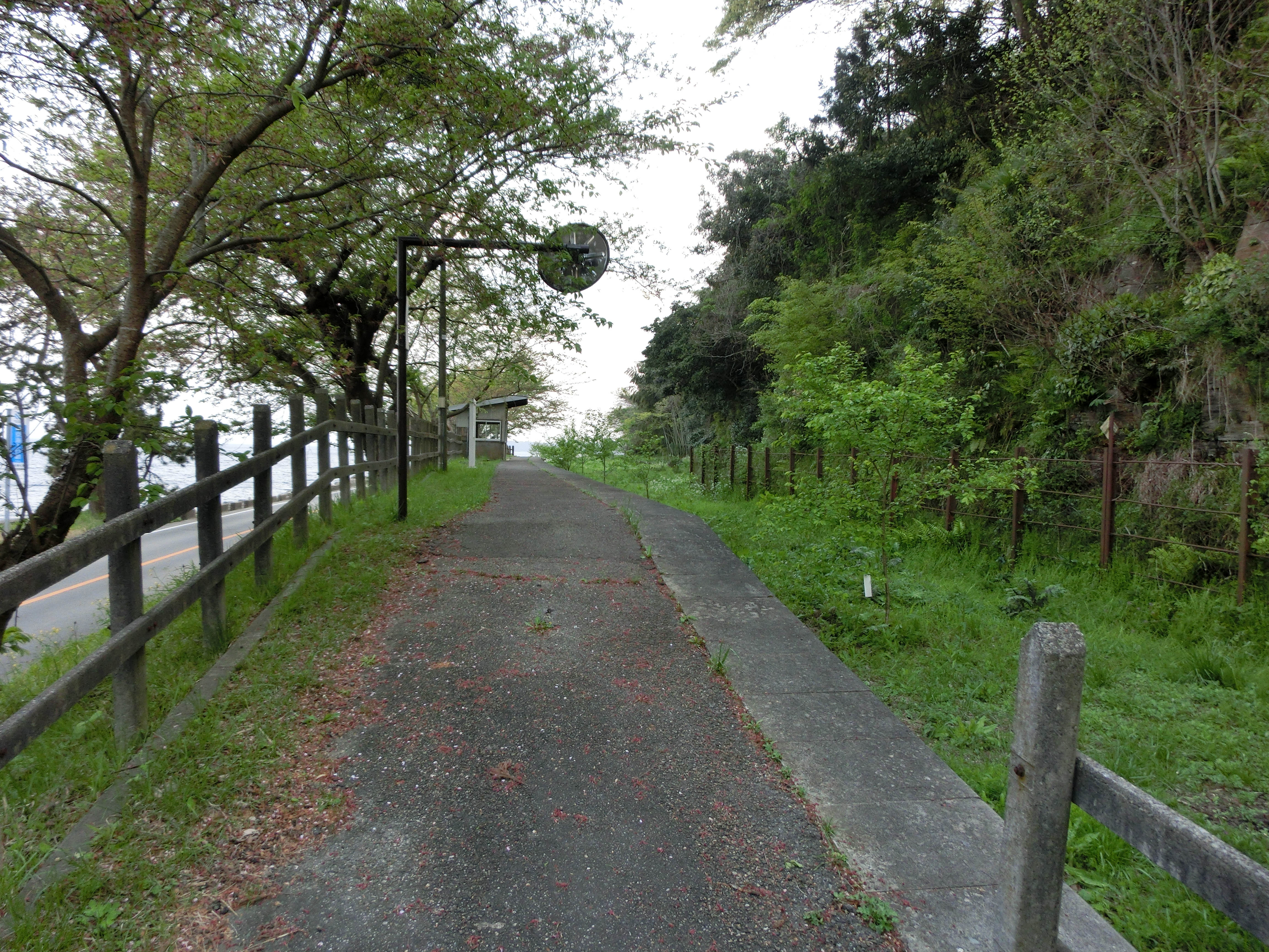 廃止後の波並駅ホーム(2017年4月撮影)